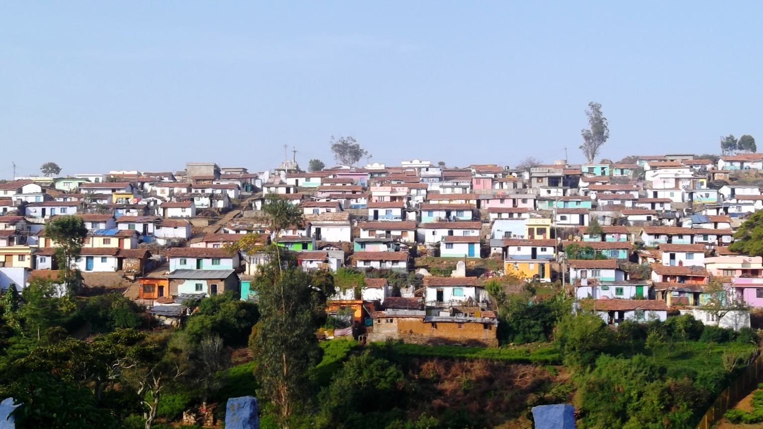 Kodanad